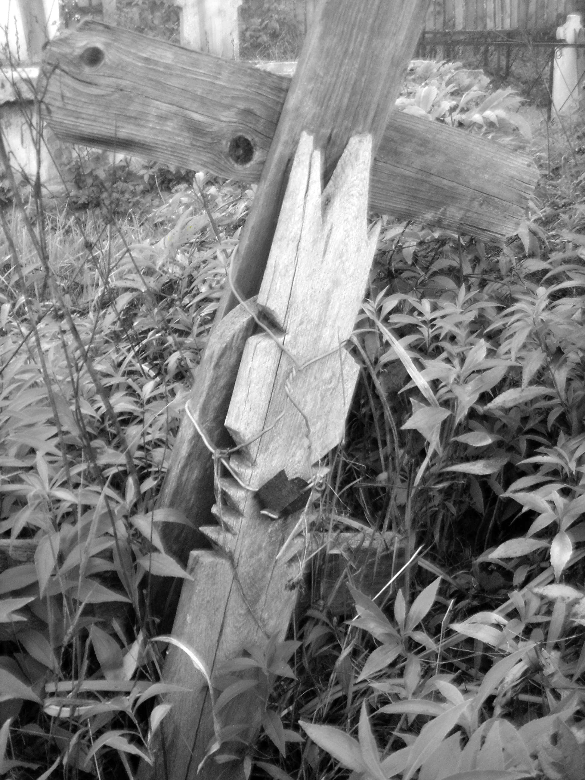 A romániai Gorzs megyében több faluban látható un. égig érő oszlop, amit azért tesznek mert hitük szerint ezen megy fel a halott lelke az égbe. A keresztet csak ez után, 40 nap múlva helyezik a sírra (Bibești, Gorzs megye, Románia)